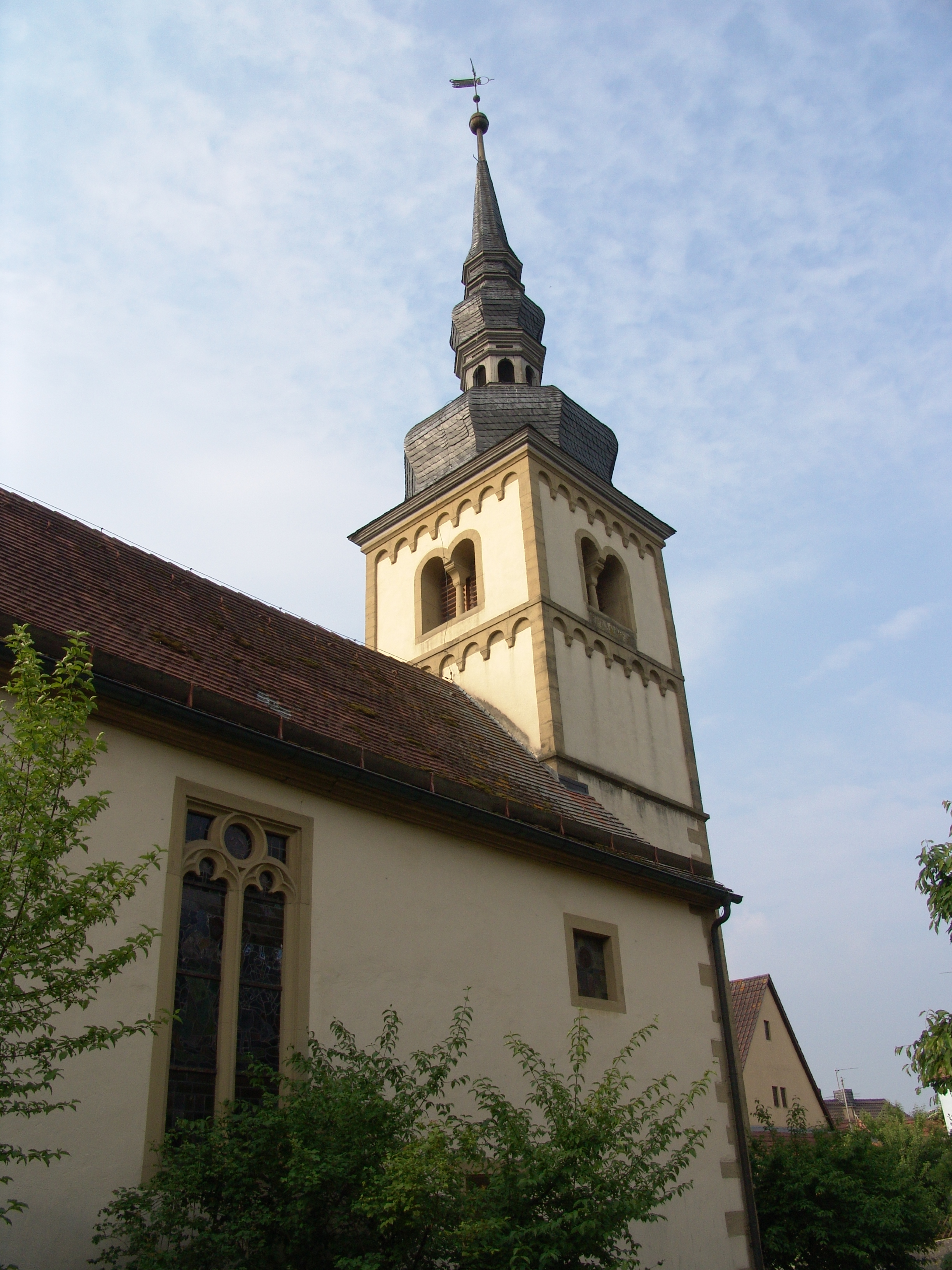 evang.-luth. Kirche St. Johannes in Gnötzheim